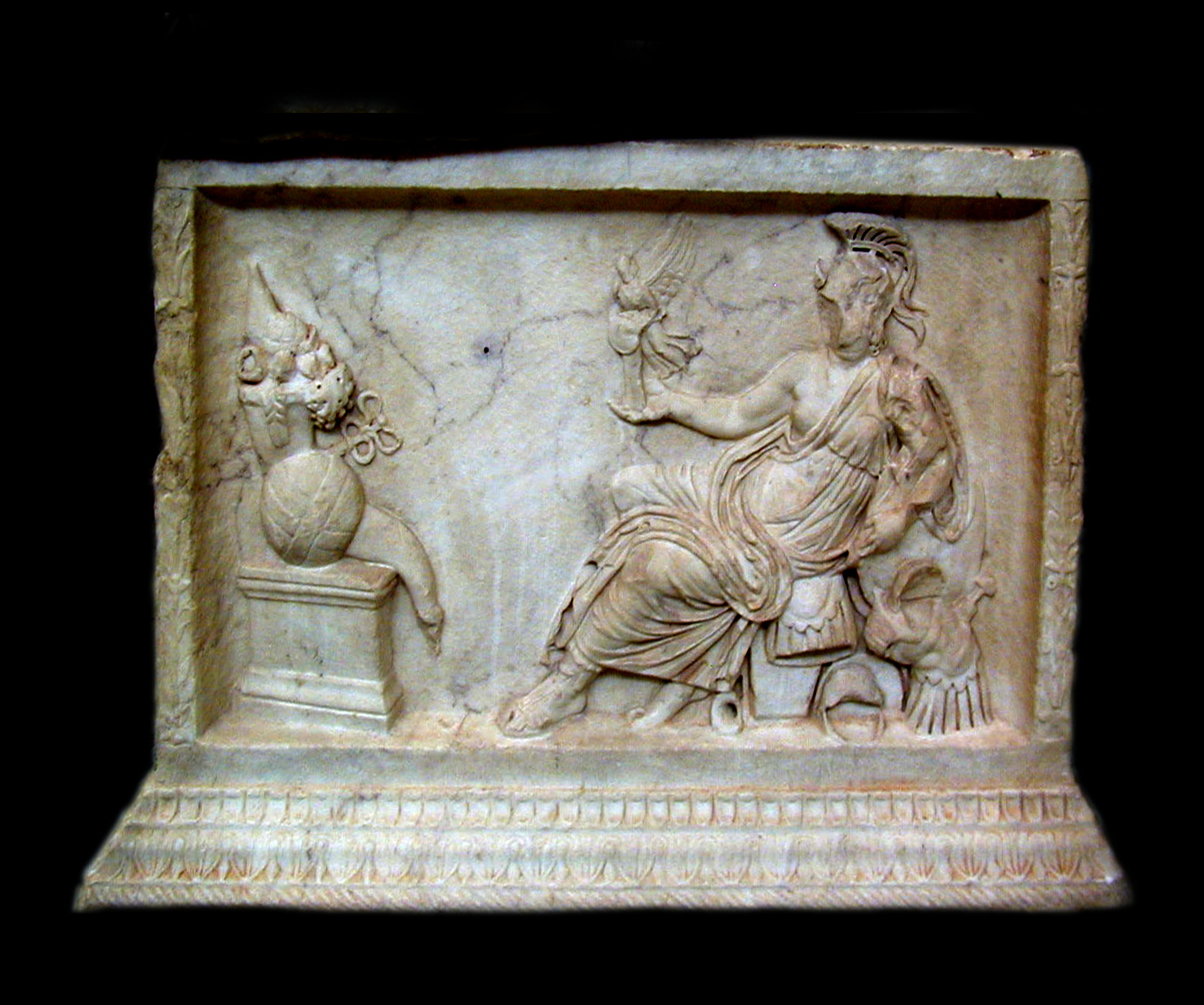 détail de l'autel de la gens augusta